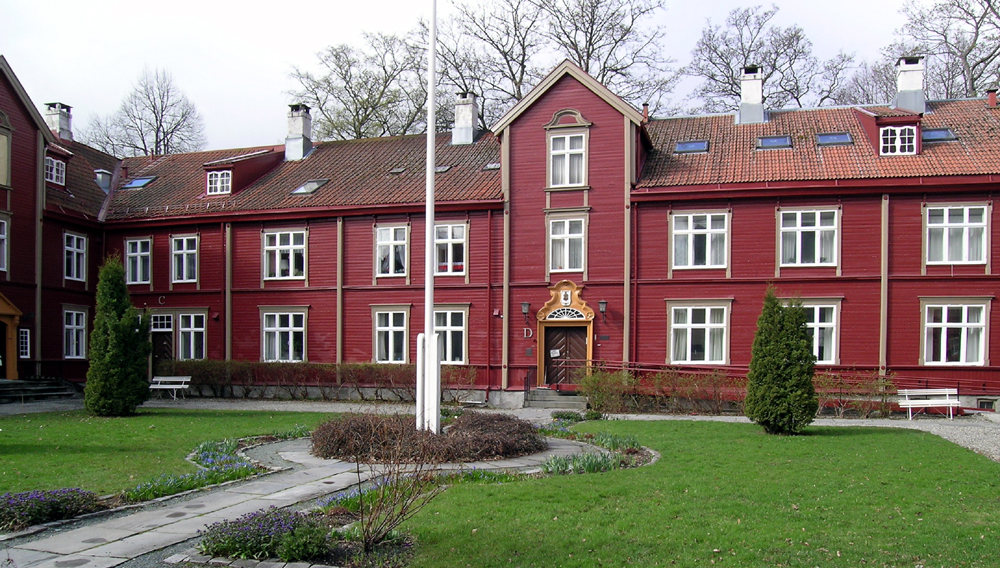 Waisenhuset, Trondheim. Bygd 1772. Arkitekt: Heinrich Kühnemann.